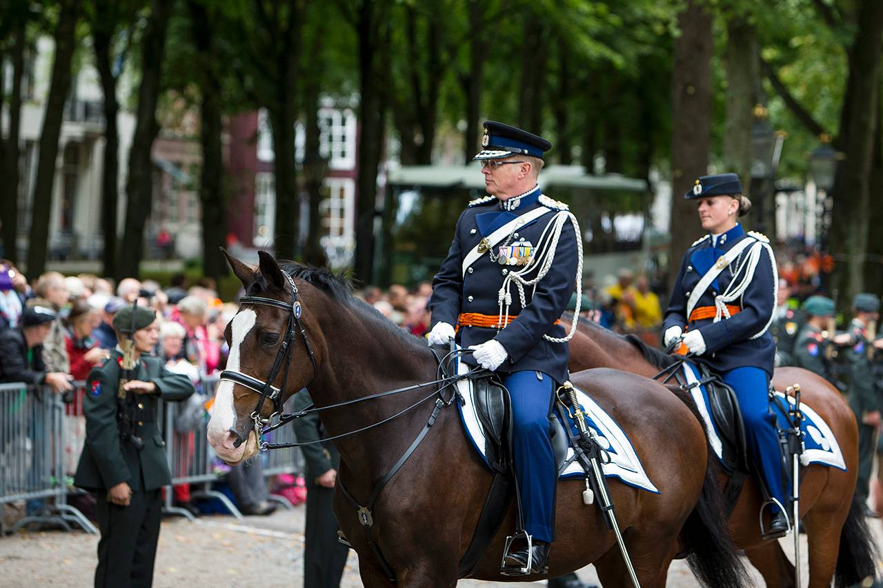 Inspectie route Gouden Koets 2015. Luitenant-generaal Hans Leijtens, commandant van de Koninklijke Marechaussee, reed vandaag voor de Koninklijke stoet uit om de route en de opgestelde erewachten te inspecteren. Dit is één van zijn taken als Gouverneur der Residentie. Deze functie houdt in dat Leijtens verantwoordelijk is voor het militair ceremonieel in Den Haag.